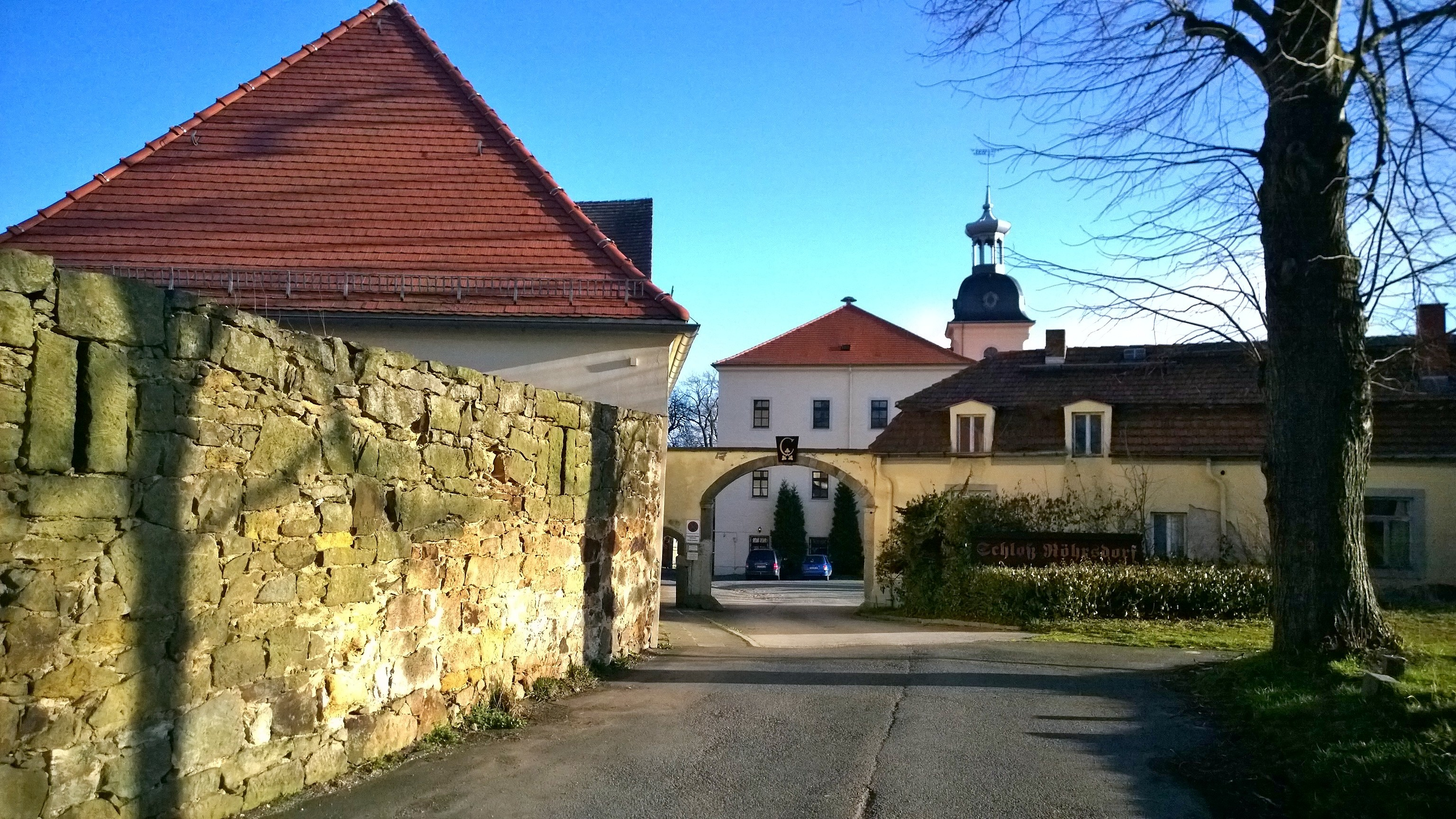 Schloss Röhrsdorf: Blick von Norden auf die Hofeinfahrt mit Wappen, links im Bild alte Wehrmauer mit senkrecht geschlitzten Schießscharten